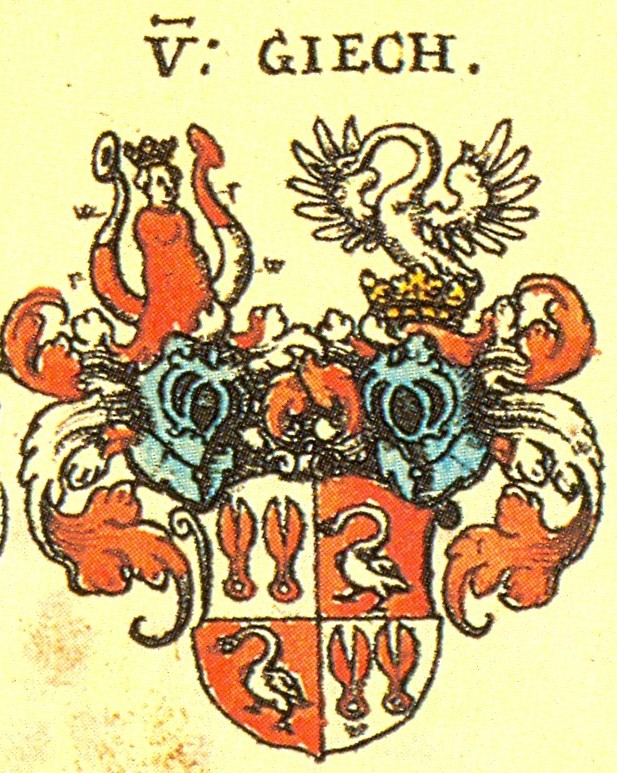 Ritterschaft und Adel in Franken von Giech